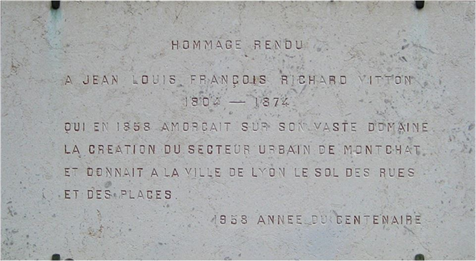 Plaque commémorative du centenaire du quartier de Montchat, apposée sur le mur ouest de l' espace Elsa-Triolet–Montchat (anciennement Le Foyer), au n° 53 de la rue Charles-Richard, Lyon 3, France.